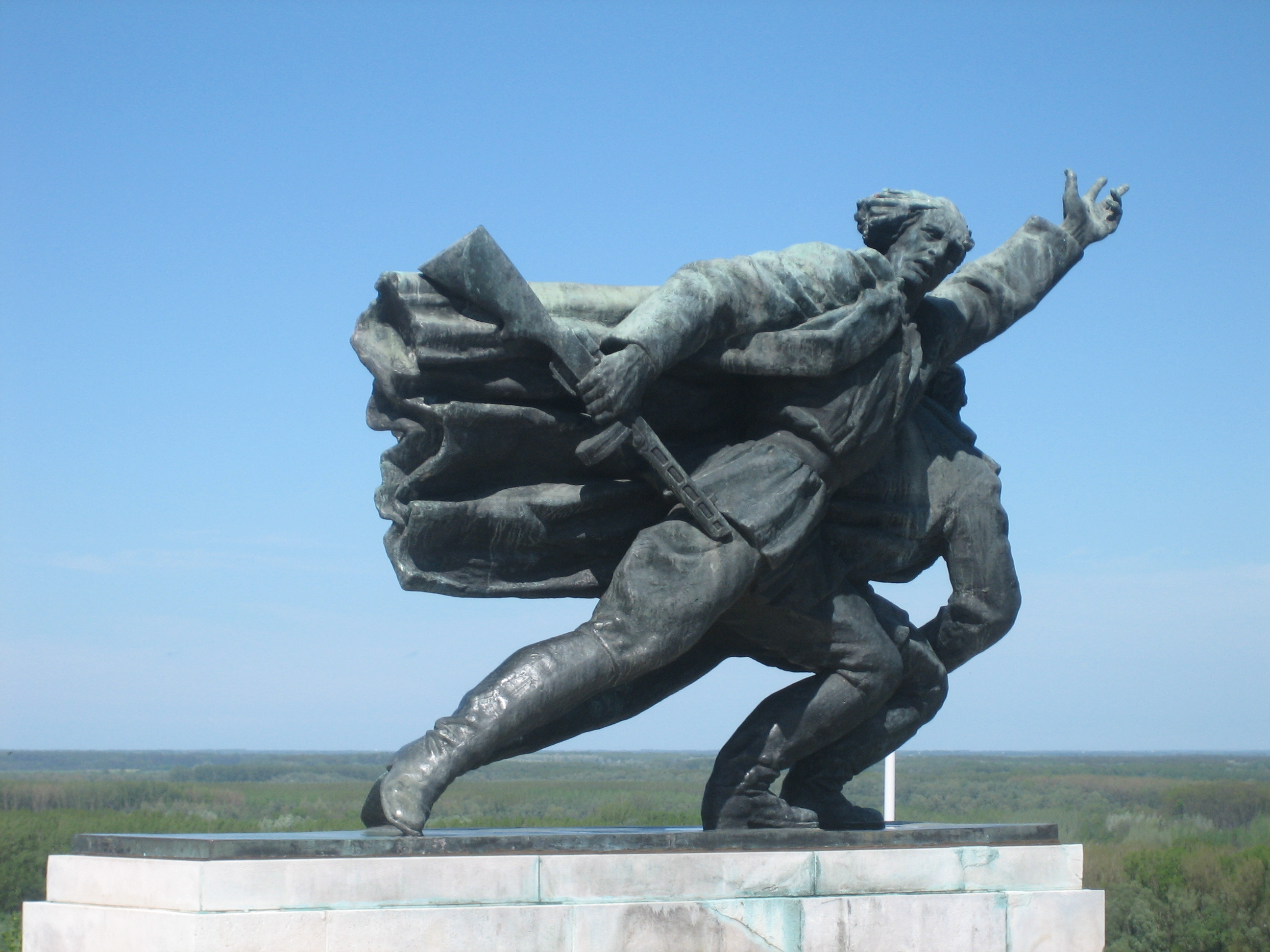 A. Augustinčić, Monument to the Battle of Batina (Batina, Croatia) / A. Augustinčić, Spomenik Batinskoj bitci (Batina).